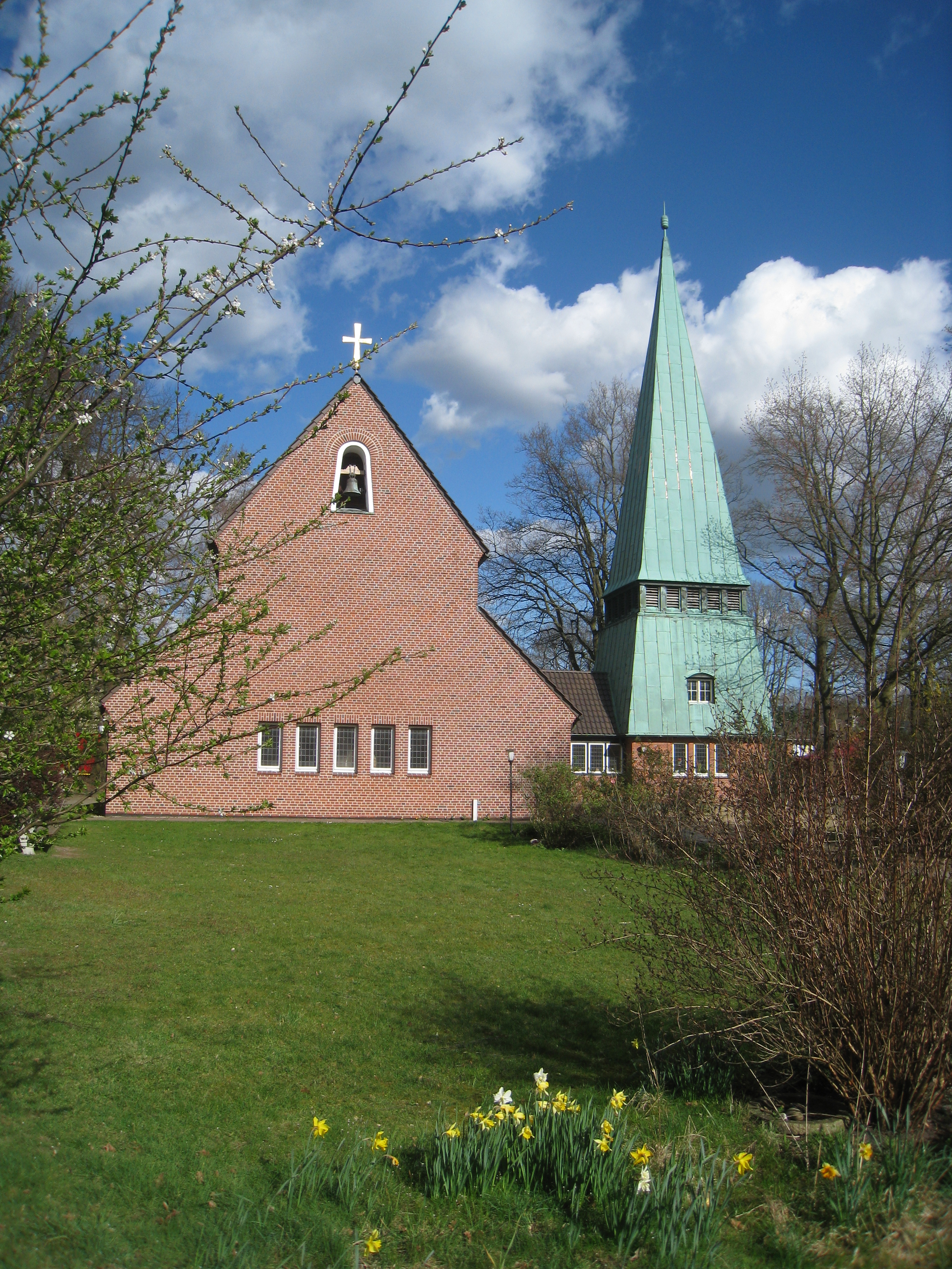 Christophorus-Kirche Poppenbüttler Stieg 25 in Hamburg-Hummelsbüttel, Ansicht vom Poppenbüttler Stieg